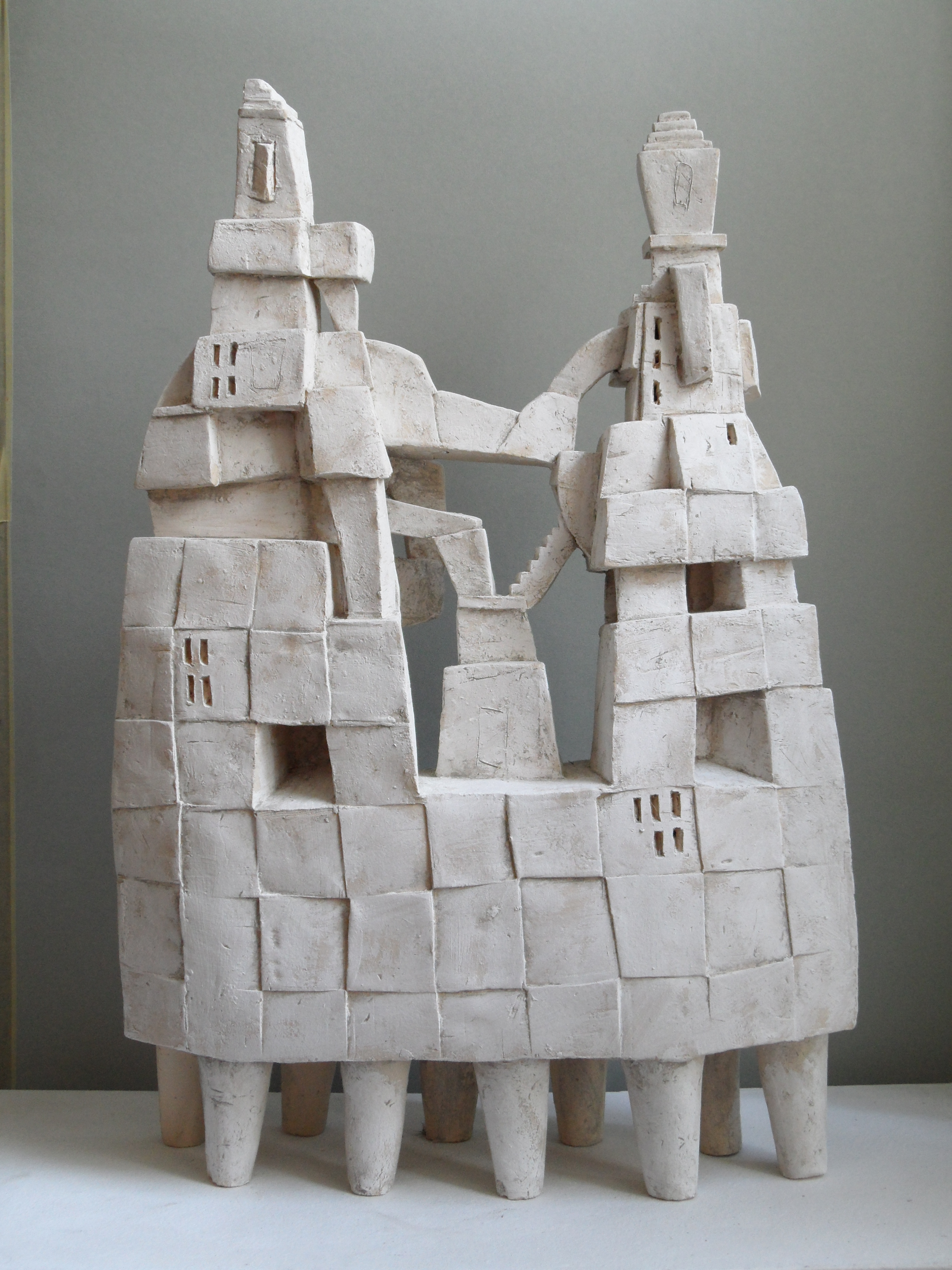 Ton bemalt 67 x47x 17